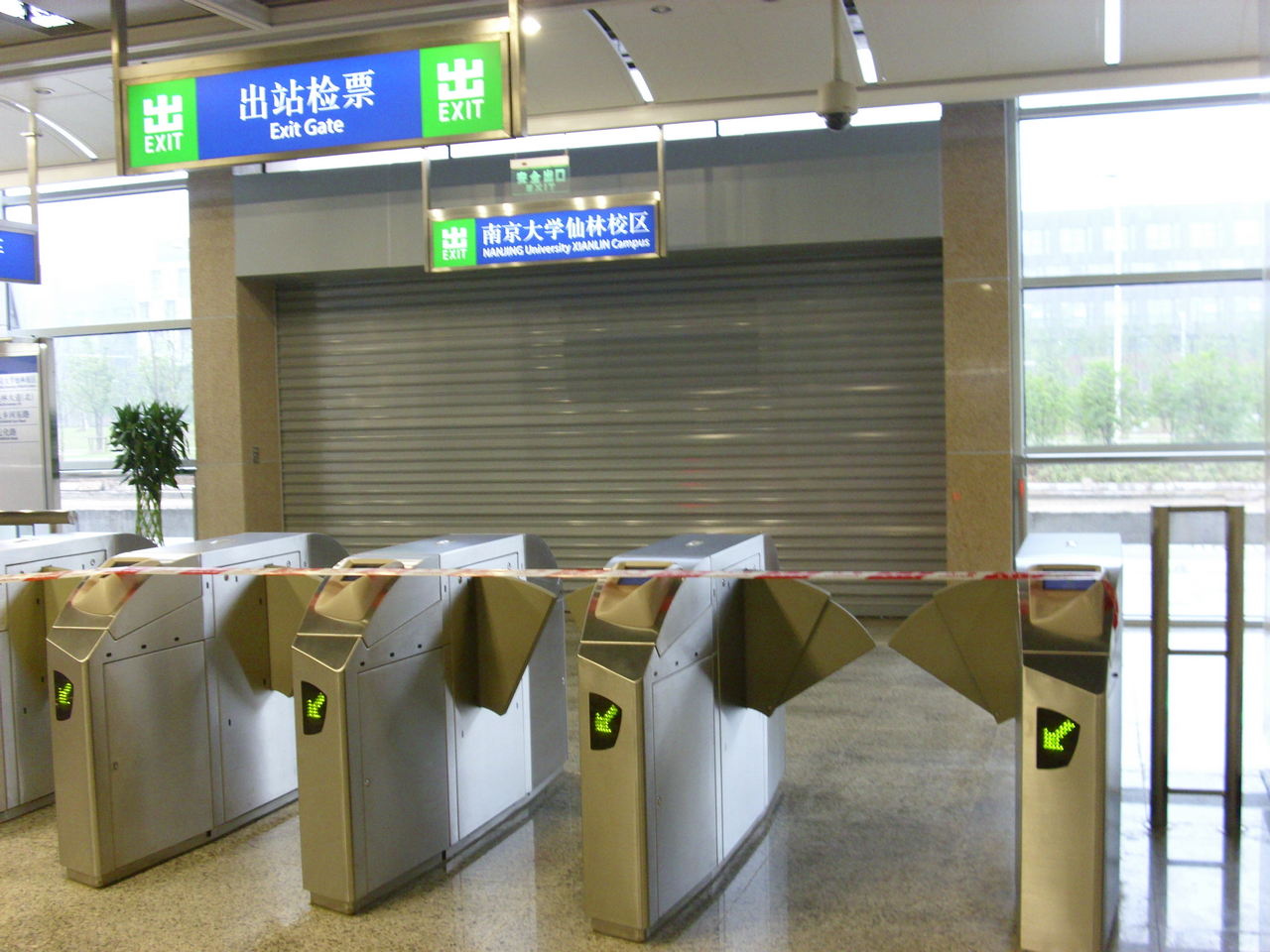 南京地铁2号线 南大仙林校区站出站闸机